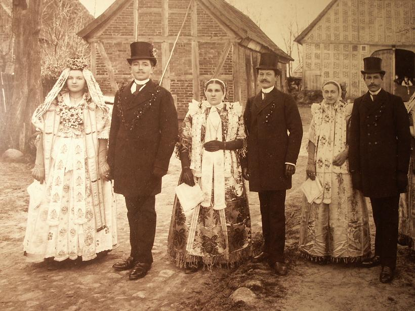 Nachgestellte Hochzeit auf einem Hof in Rebenstorf unter Leitung von "Kantor Mente" um 1900. (Original im Privatarchiv JHAMK Jameln